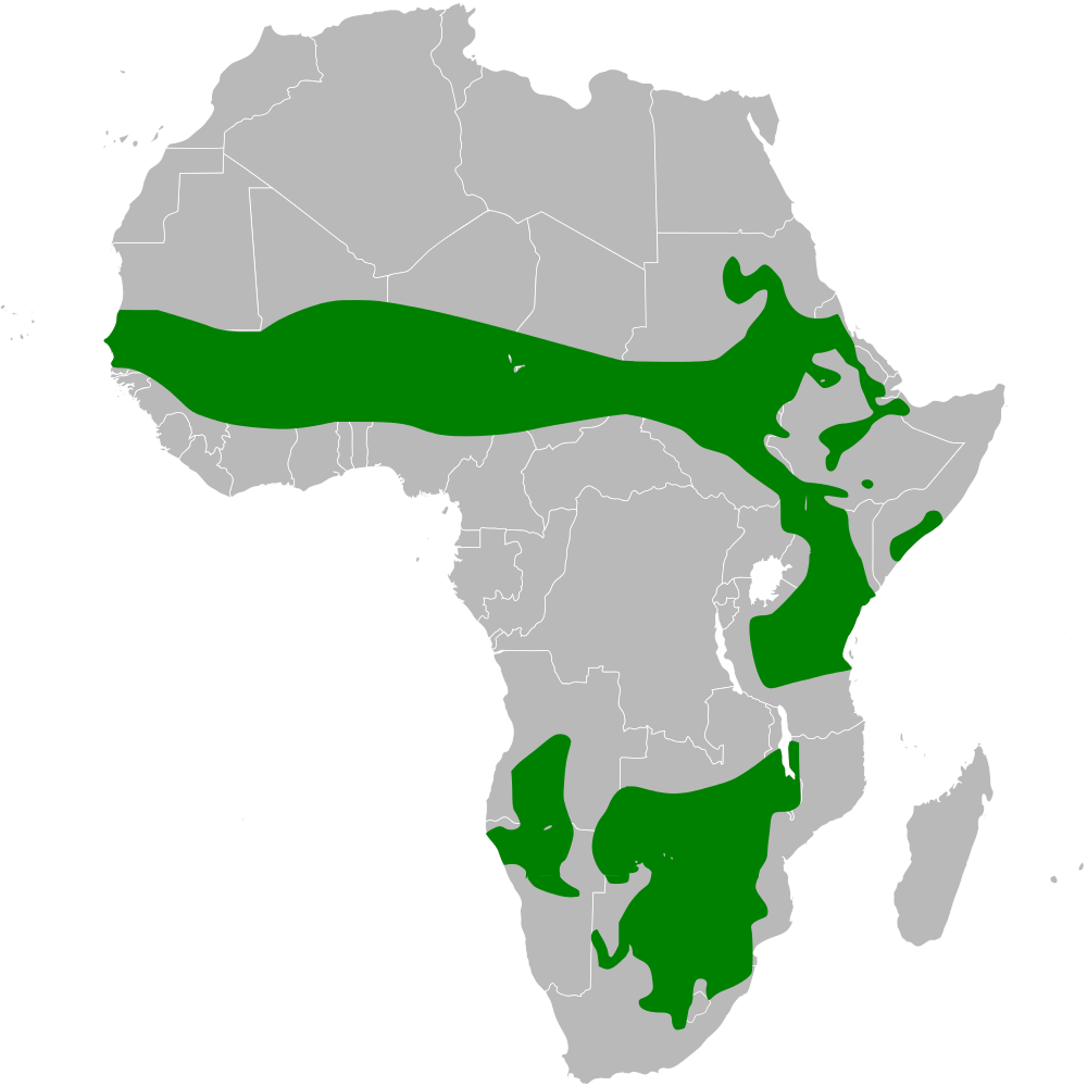 Eremopterix leucotis distribution map based on